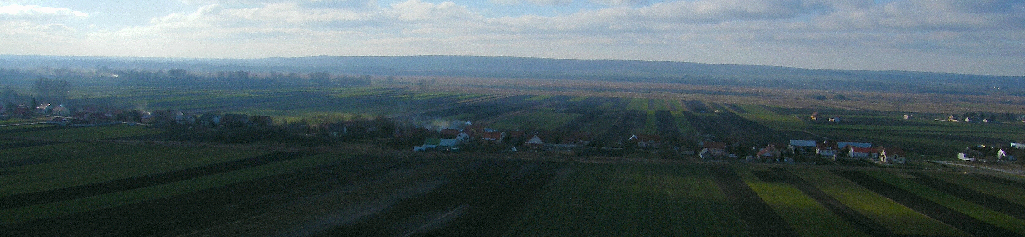 Widok na Wolę Zagojską Dolną ze wzniesień na terenie Woli Zagojskiej Górnej c.d.